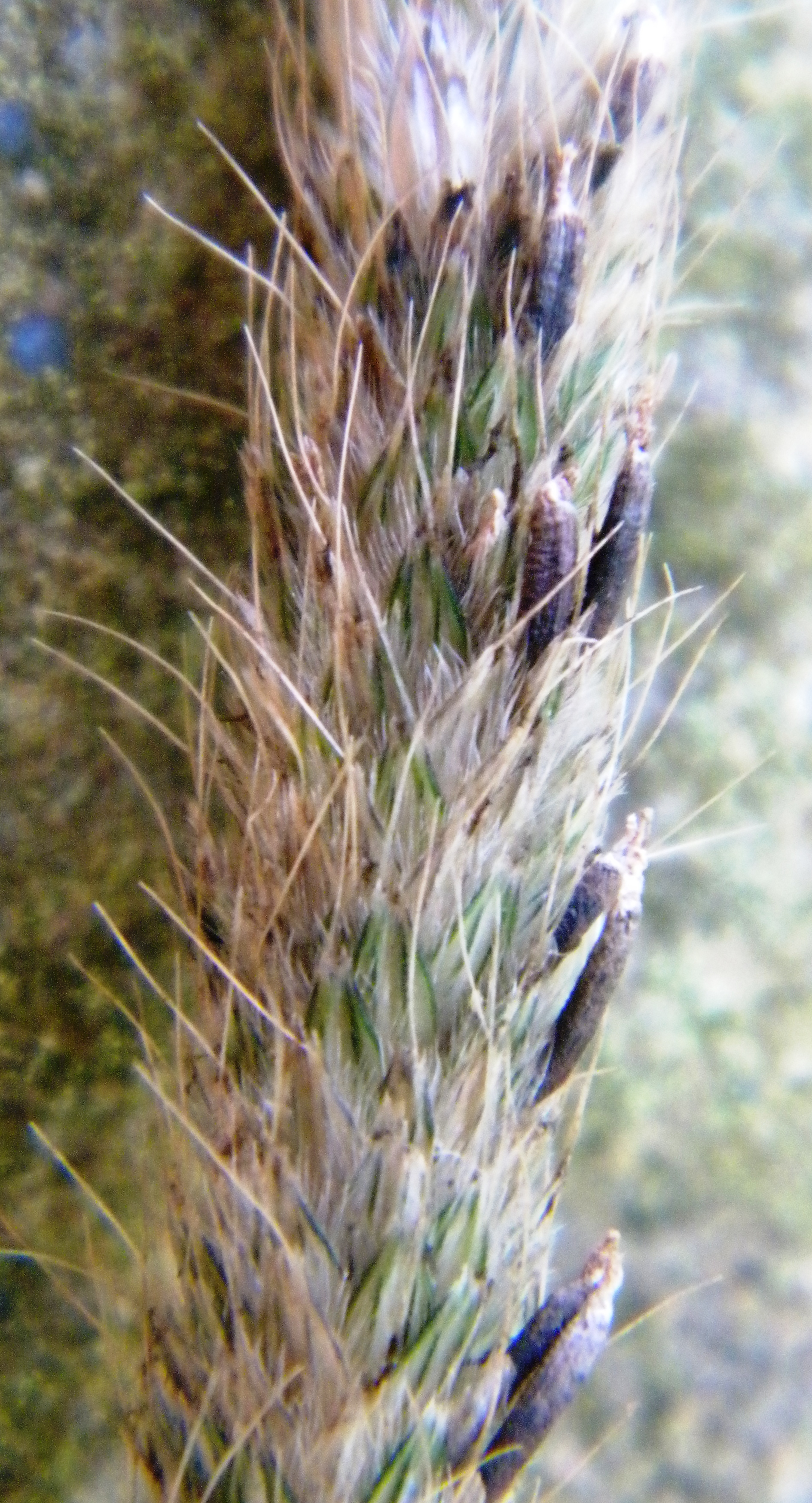 Alopecurus pratensis avec ergots